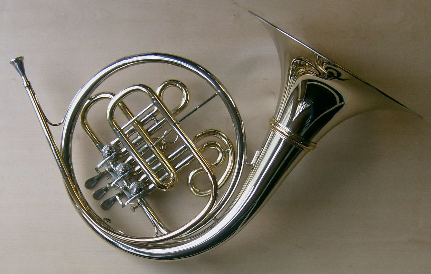 B-Waldhorn in Rückansicht (Bearbeitung smial 15:49, 5 December 2006 (UTC))